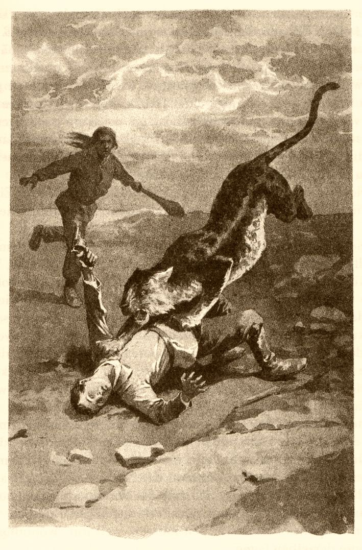 Ilustrace Věnceslava Černého k románu Karla Maye Odkaz Inky z roku 1908